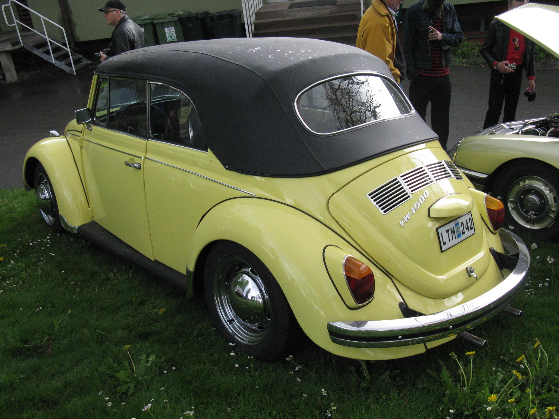 Volkswagen 1500 Cabriolet